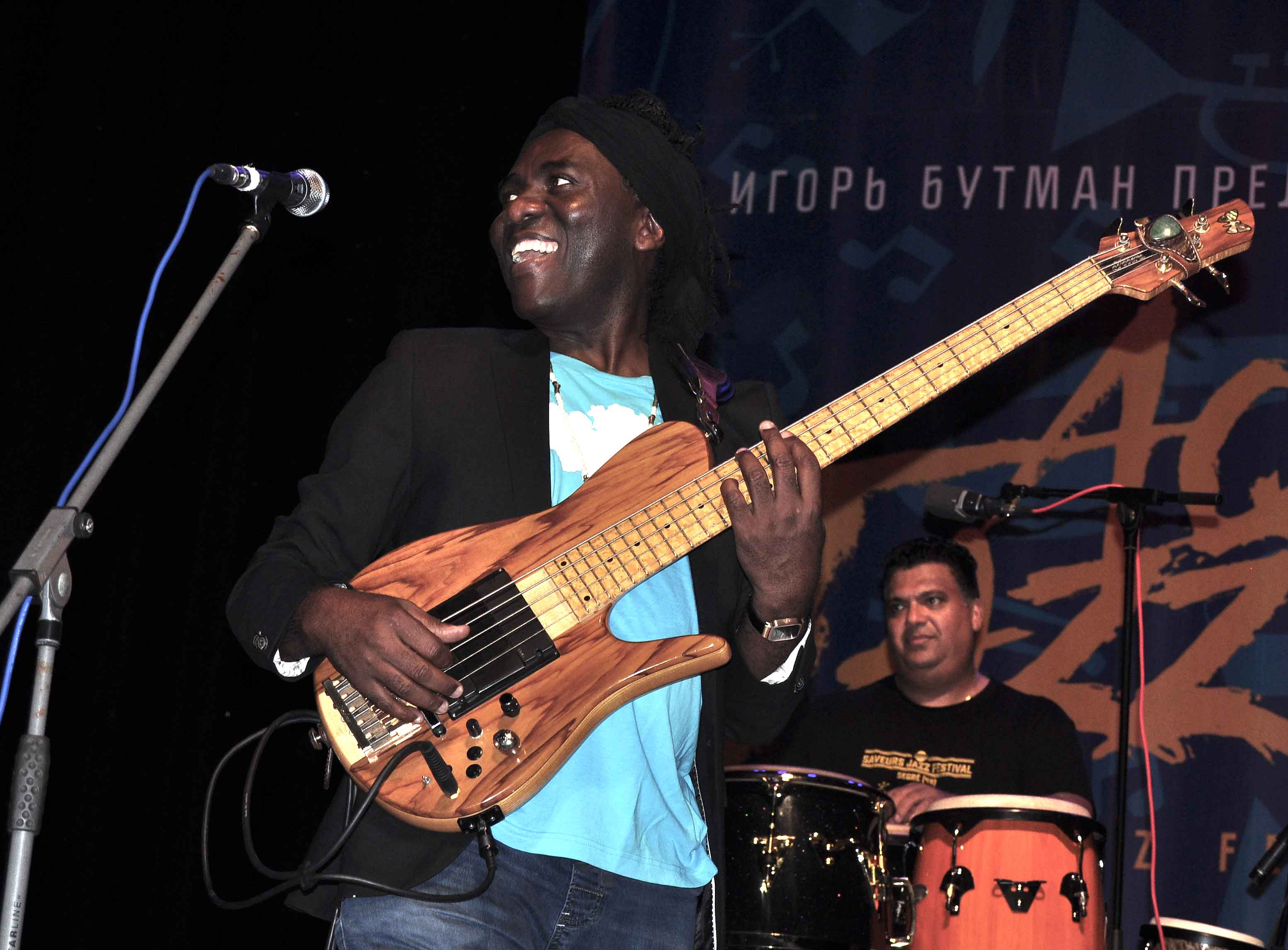 Richard Bona на сцене концертного зала "Фестивальный" в рамках фестиваля "Акваджаз" в Сочи